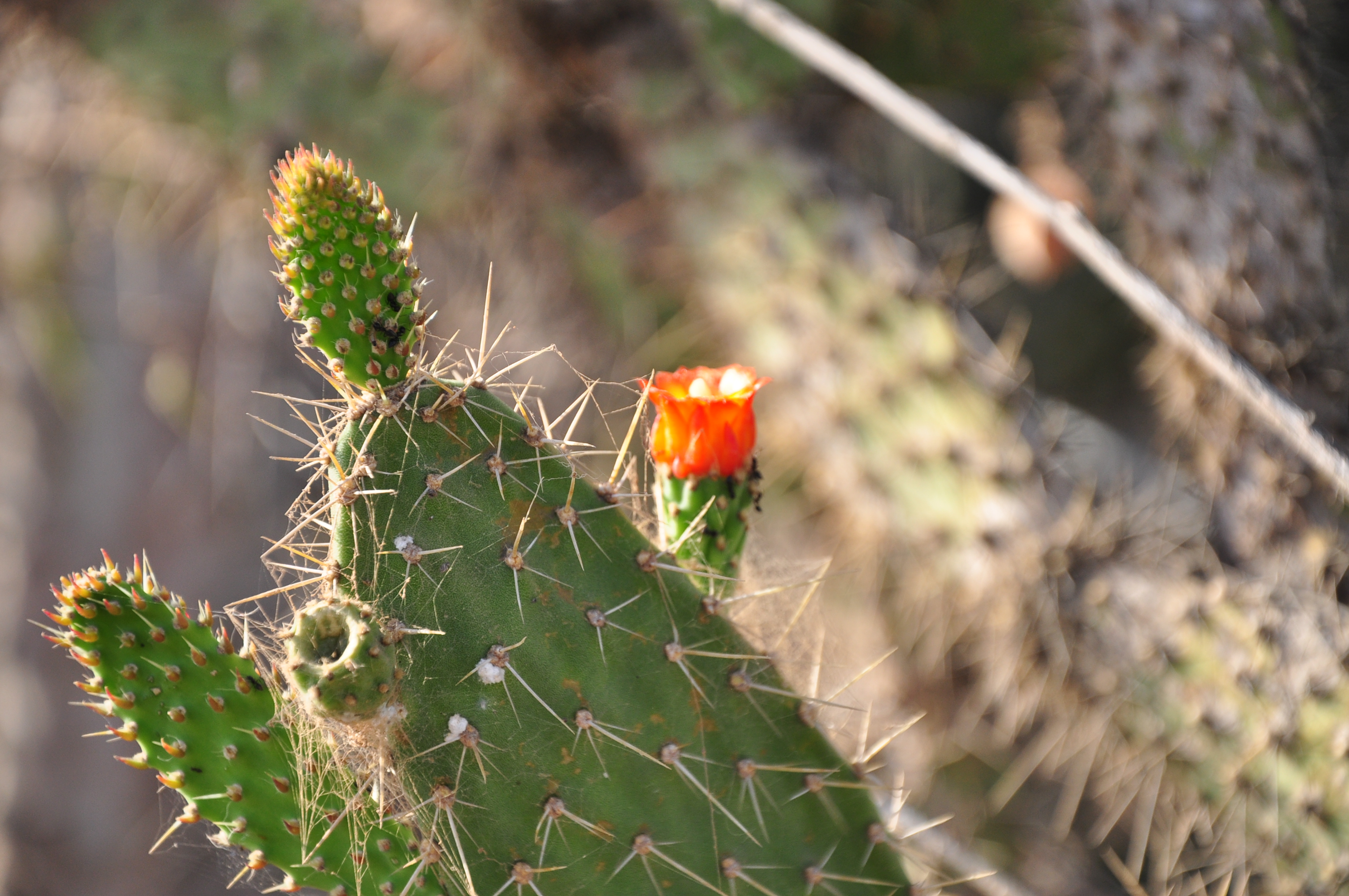 Paisagem do Sertão no Interior Baiano